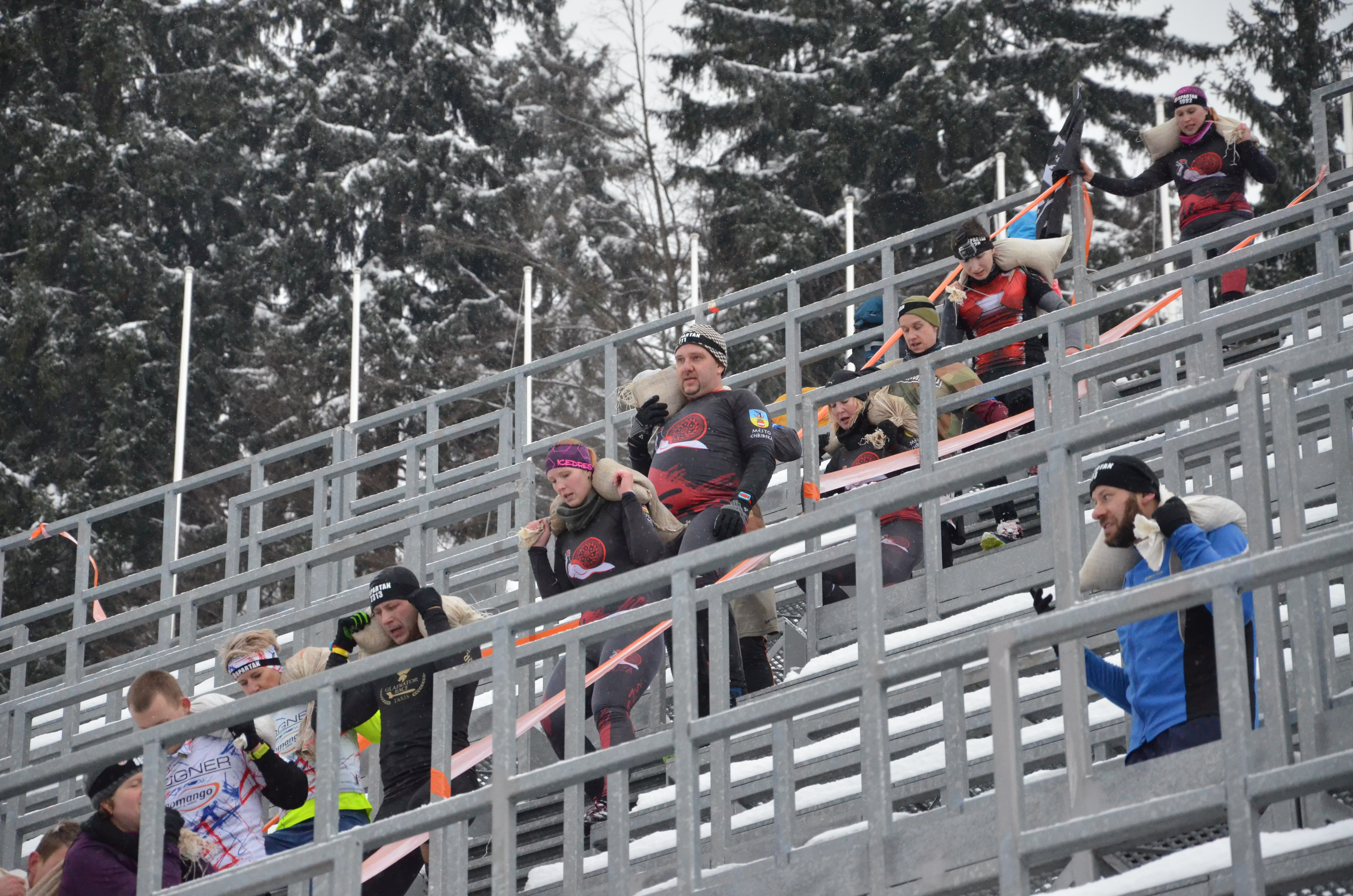 preka